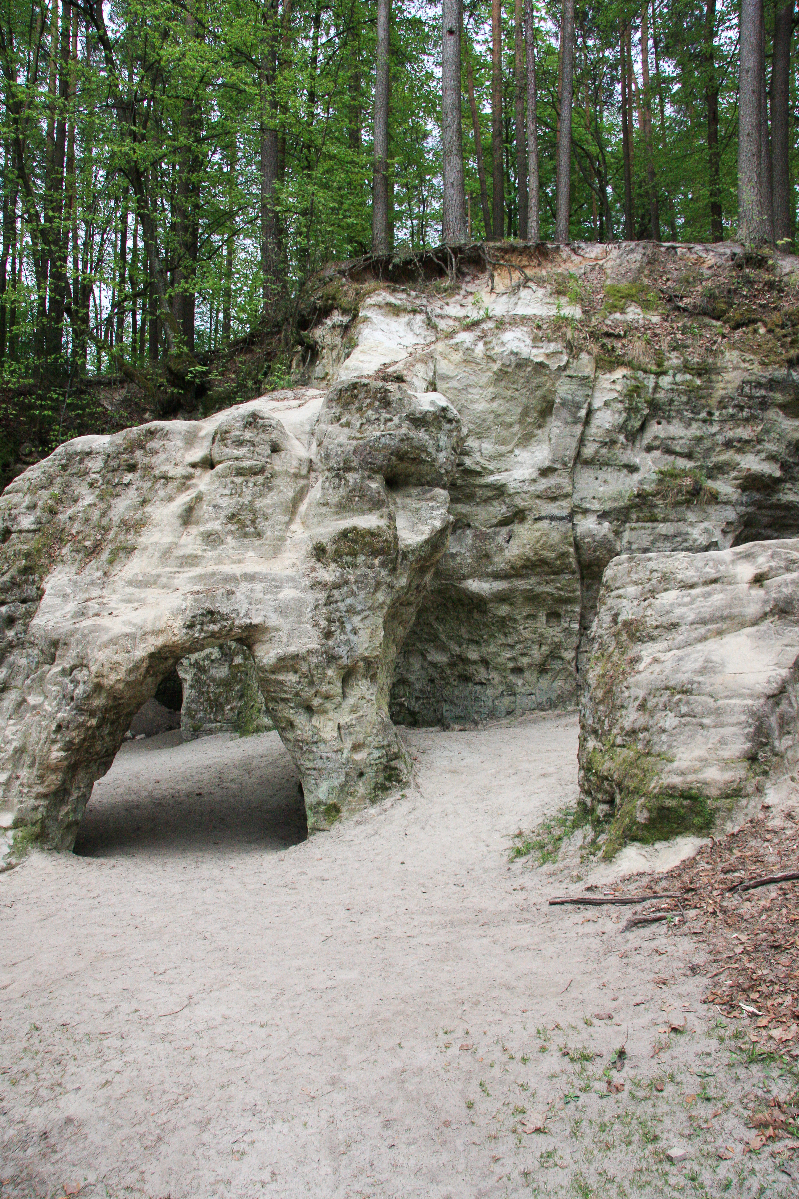 Lielā Ellīte